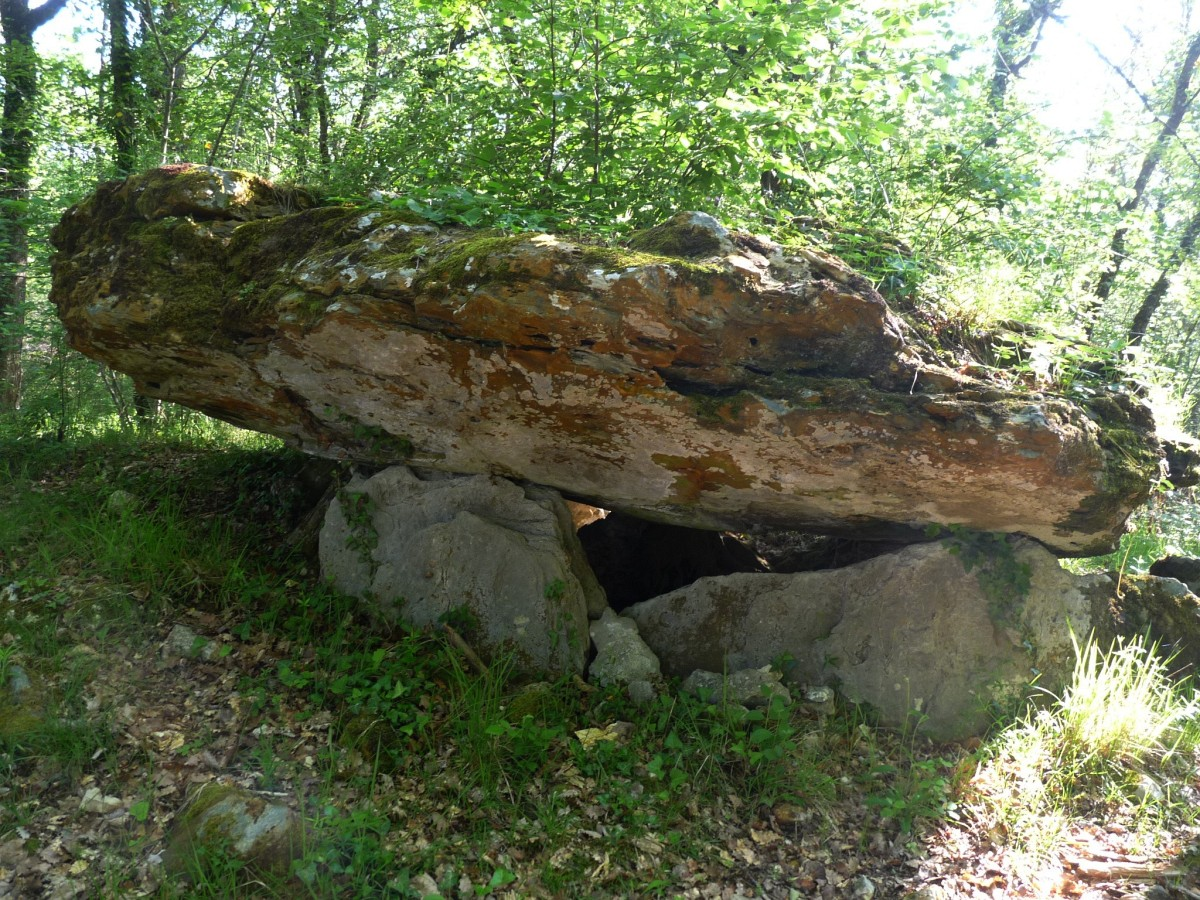 Dolmen de Pierre Rouge, Edon (Charente, France); vue du sud